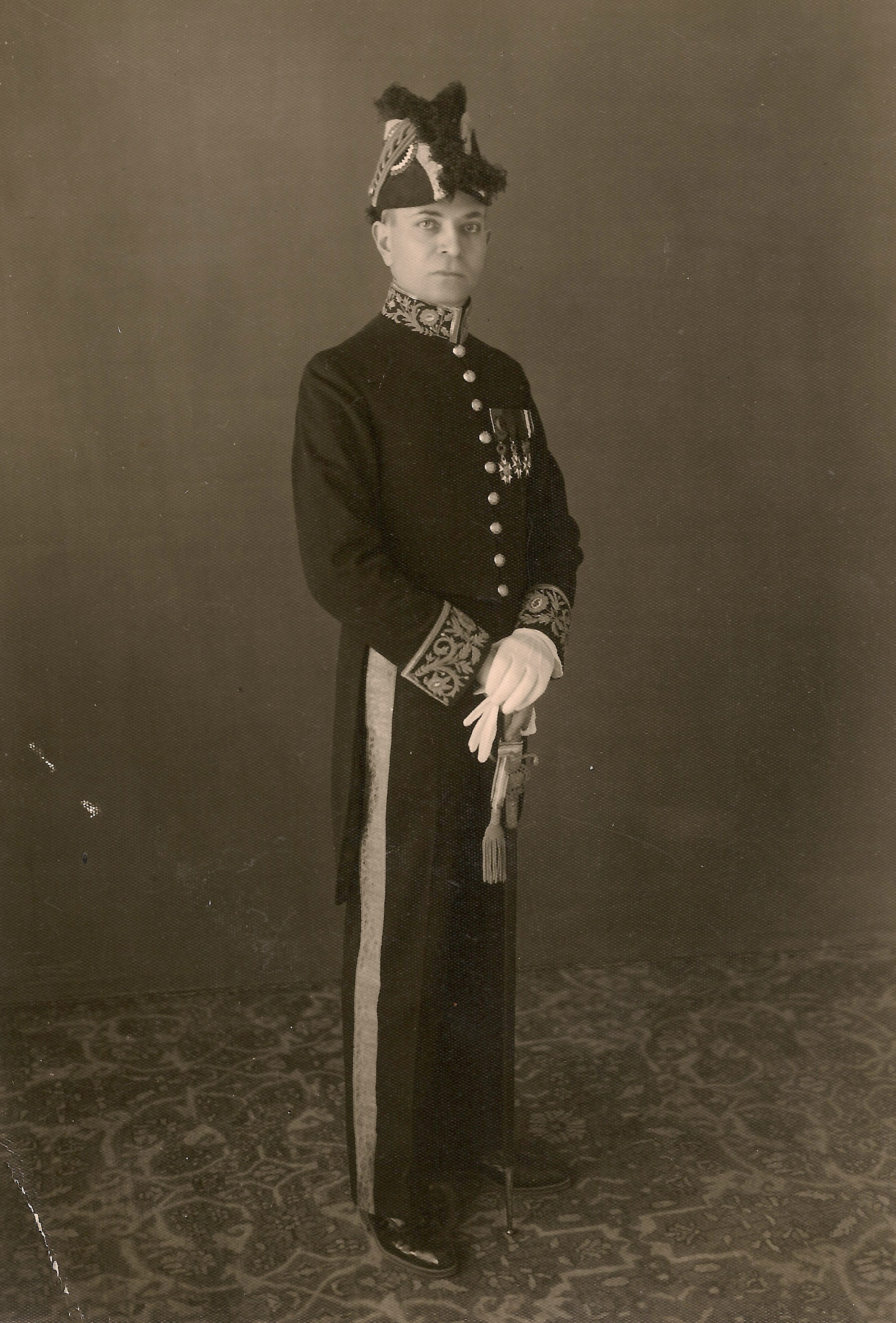 Abdollah Khan Momtaz (Momtaz ol-Mamalek) en habit de diplomate